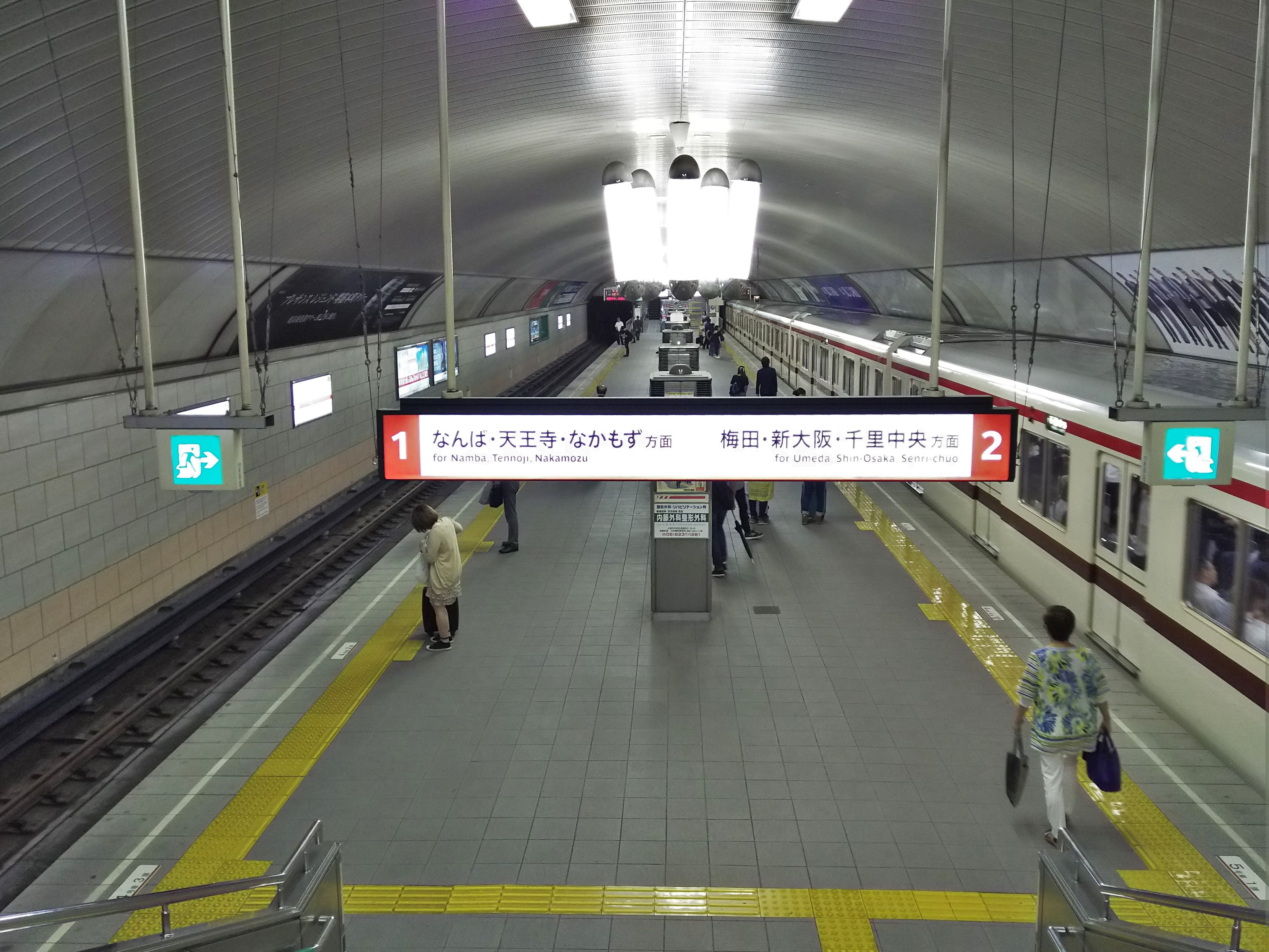 大阪市営地下鉄御堂筋線淀屋橋駅プラットホーム（大阪市中央区）